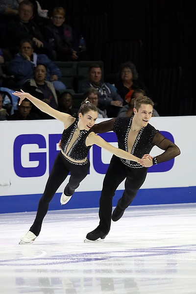 Эвелин Уолш и Треннт Мишо на этапе Гран-при Skate America 2018